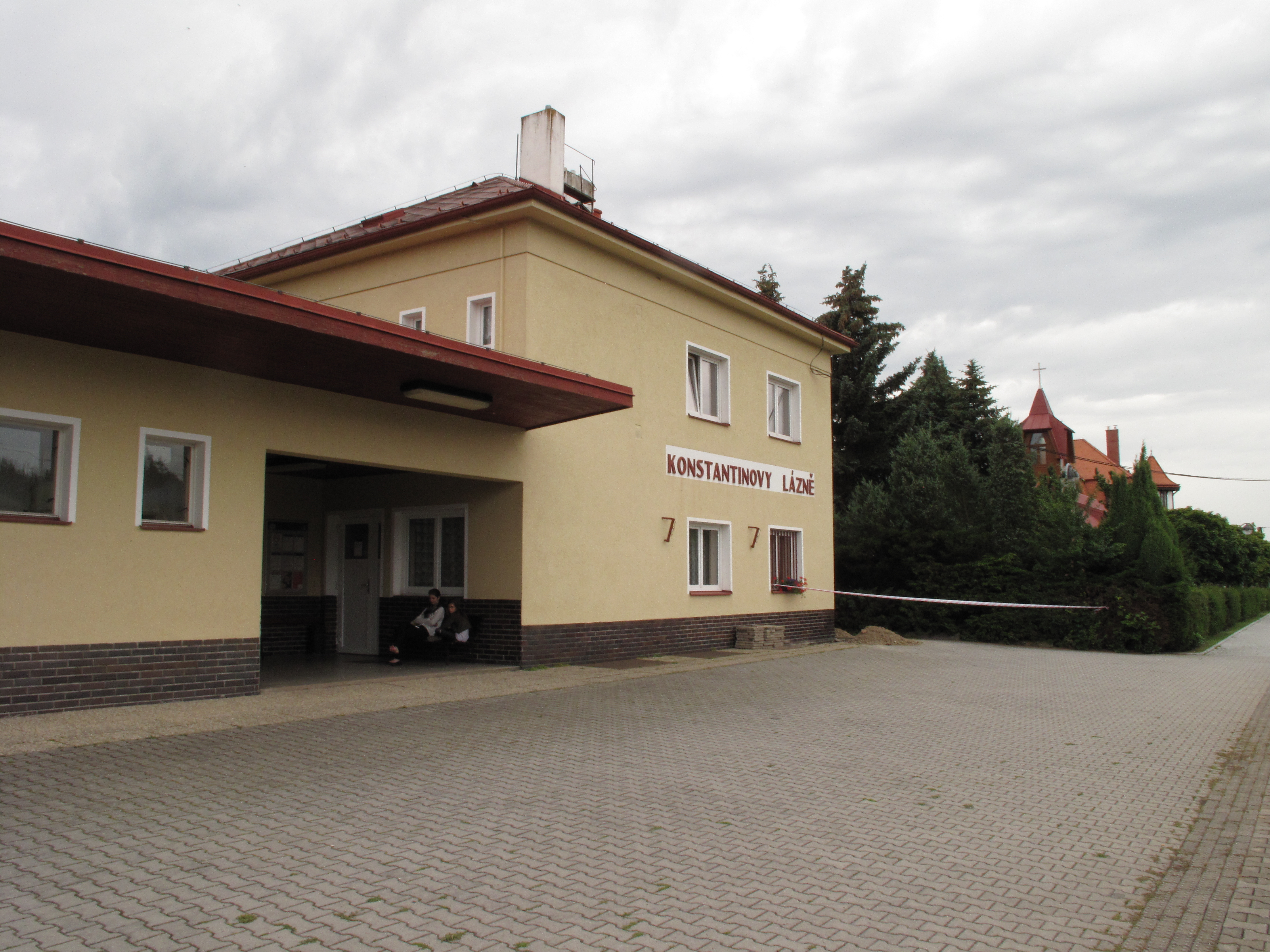 Vlaková zastávka v Konstantinových Lázních. Okres Tachov, Česká republika.